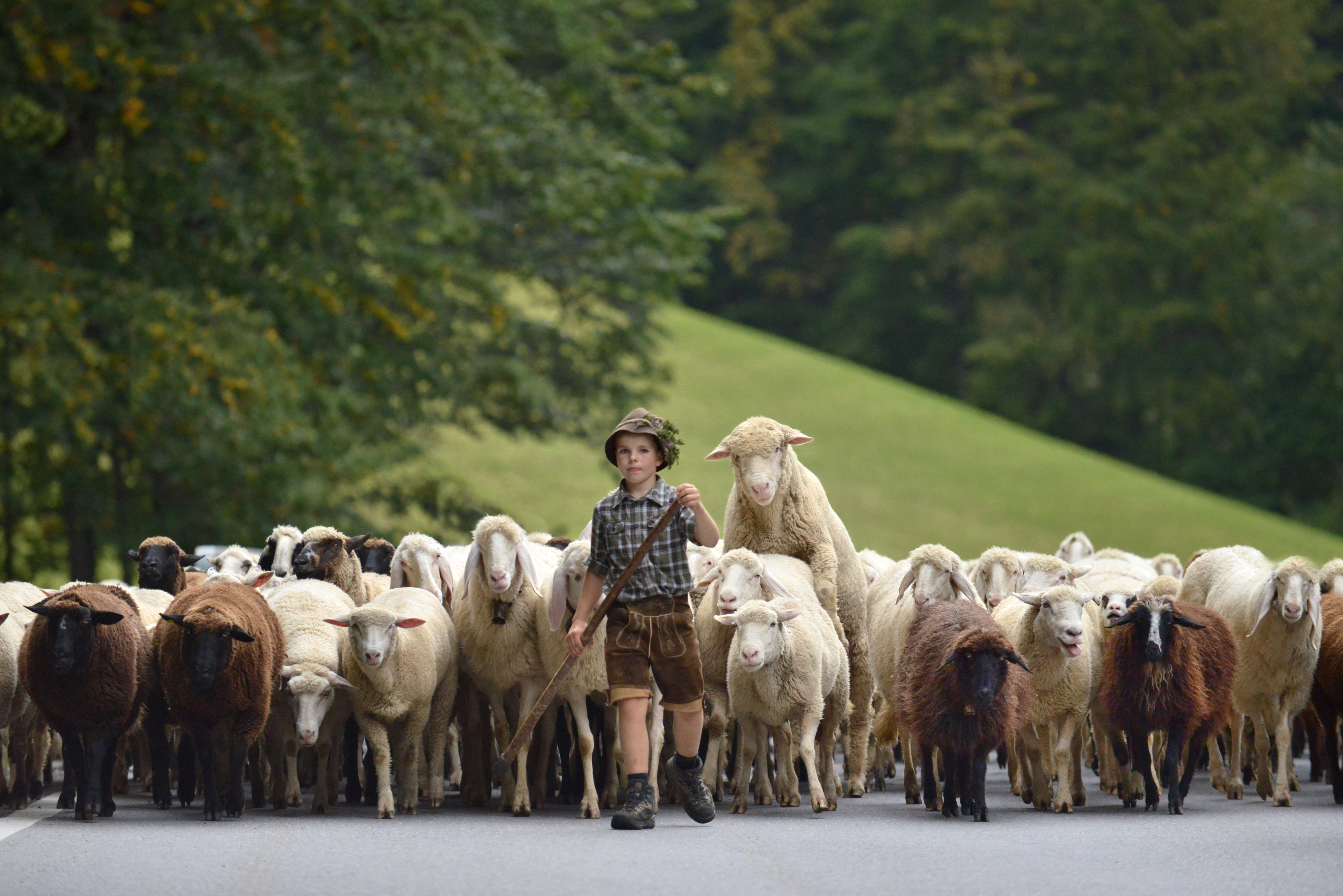 2014, Almabtrieb der Schafe von Schröcken nach Schoppernau im Bregenzerwald Dieses Highlight wird mit dem “Veahmätle” (kleiner Viehmarkt) gefeiert.